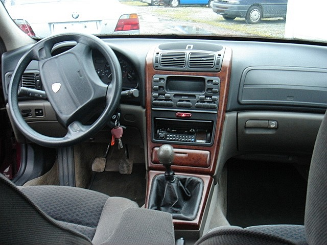 Lancia Kappa, Baujahr 1996, Armaturen